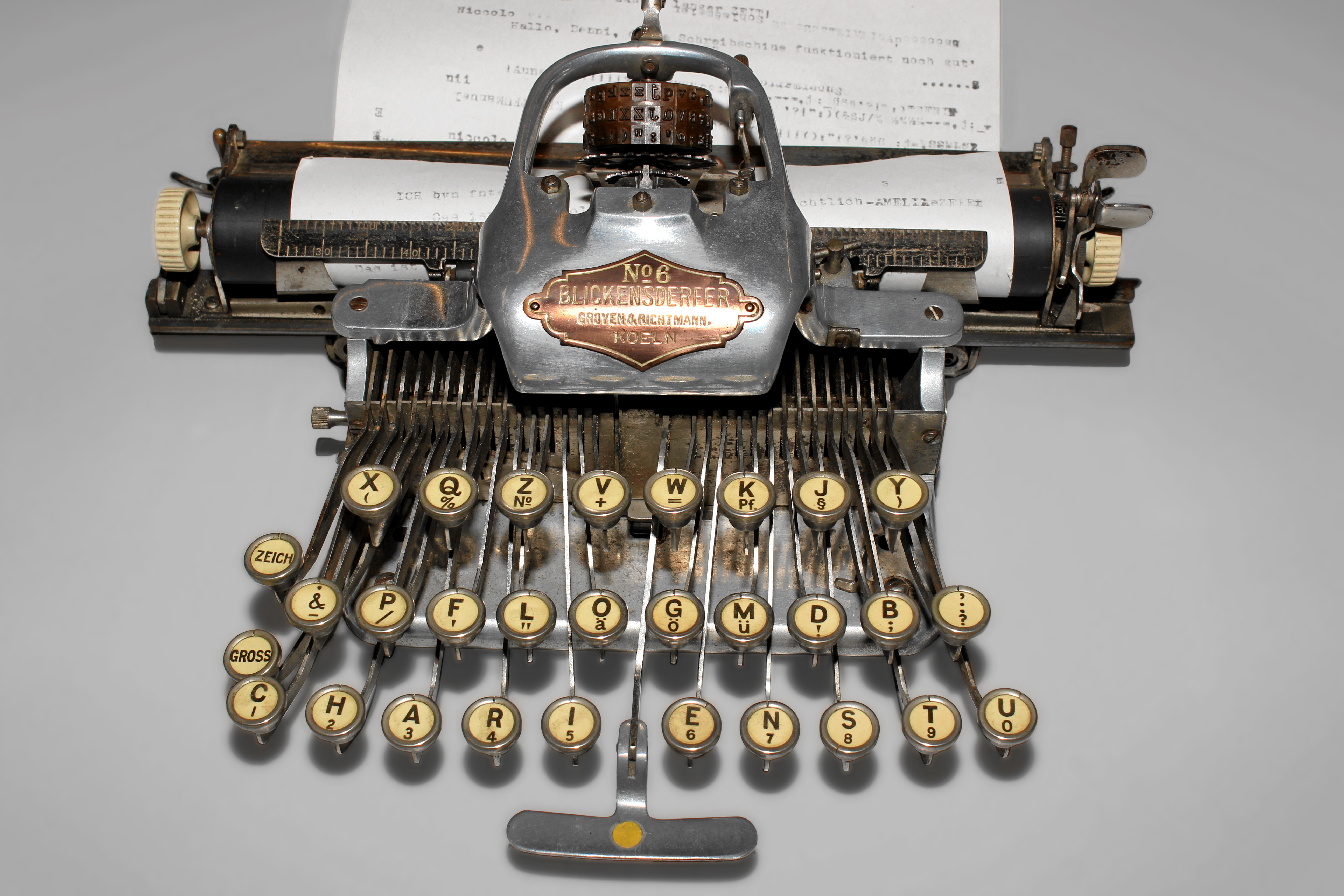 Blickensderfer No 6